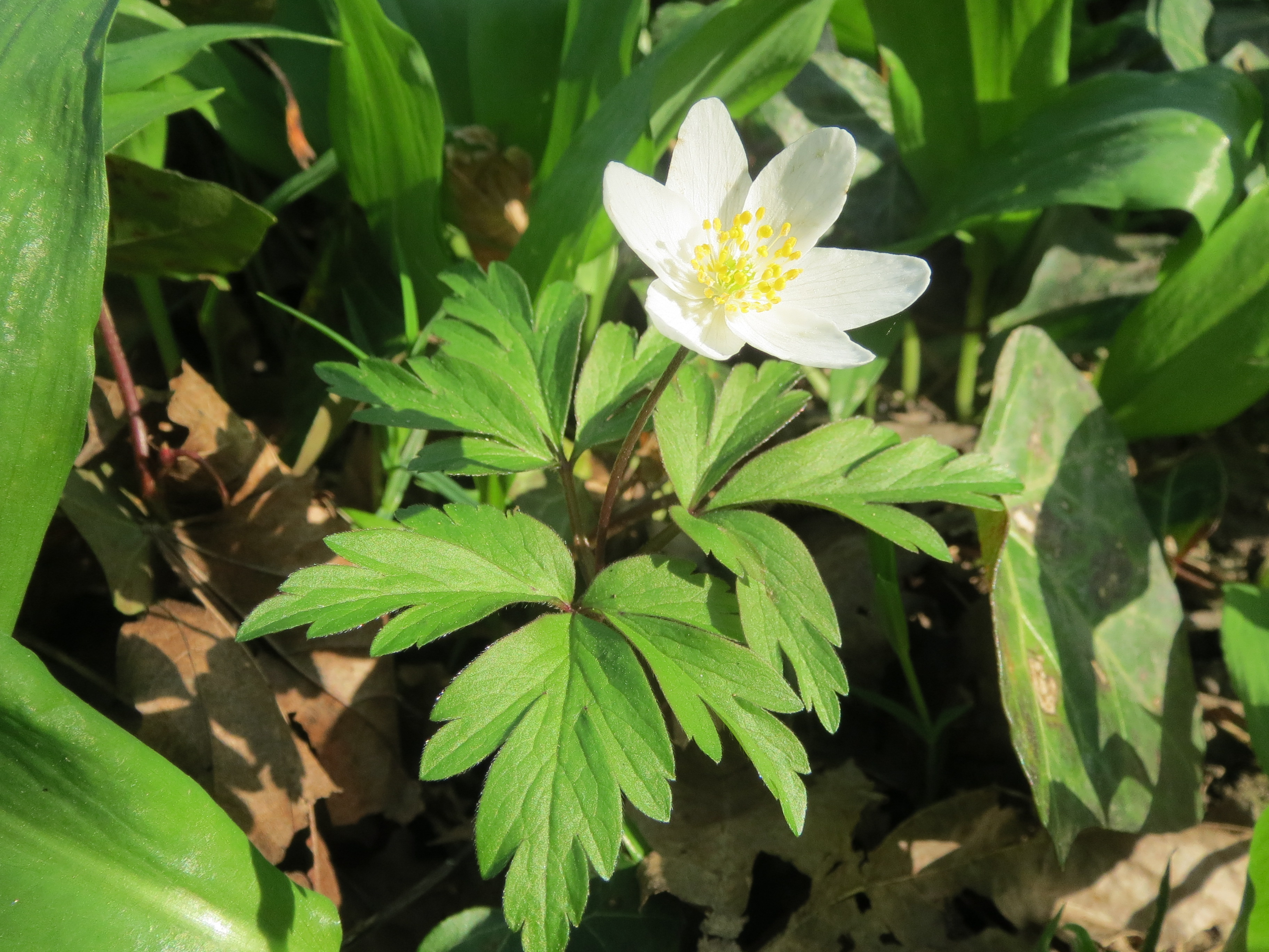 Buschwindröschen (Anemone nemorosa) im Ketscher Wald